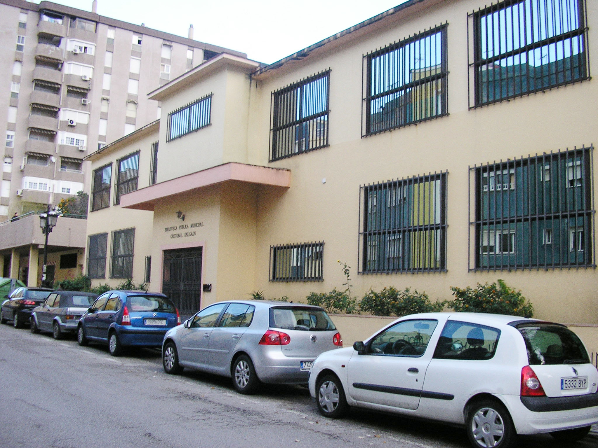 Biblioteca municipal Critobal Delgado de Algeciras, Andalucía, España.